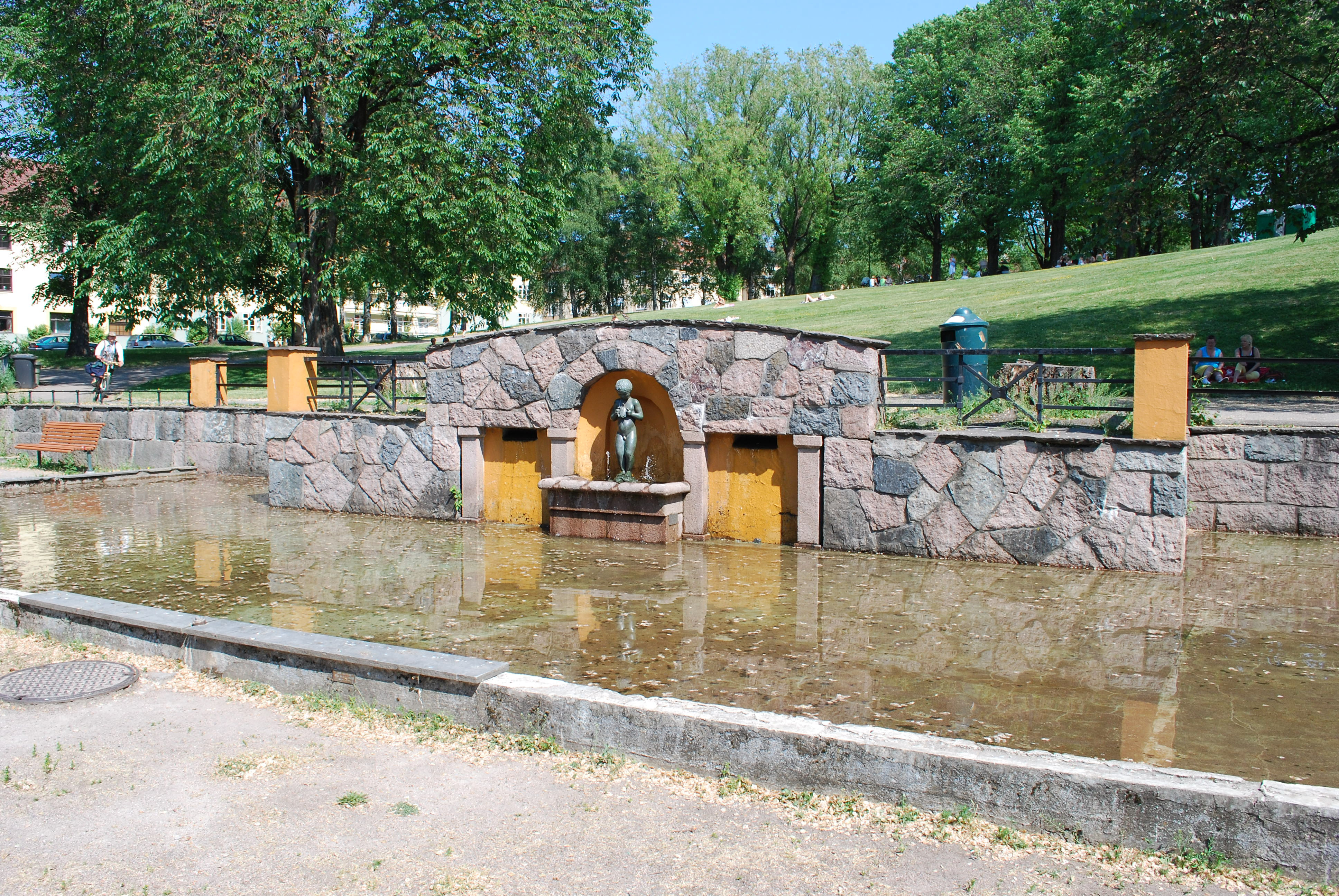 Dammen i Torshovparken, Oslo